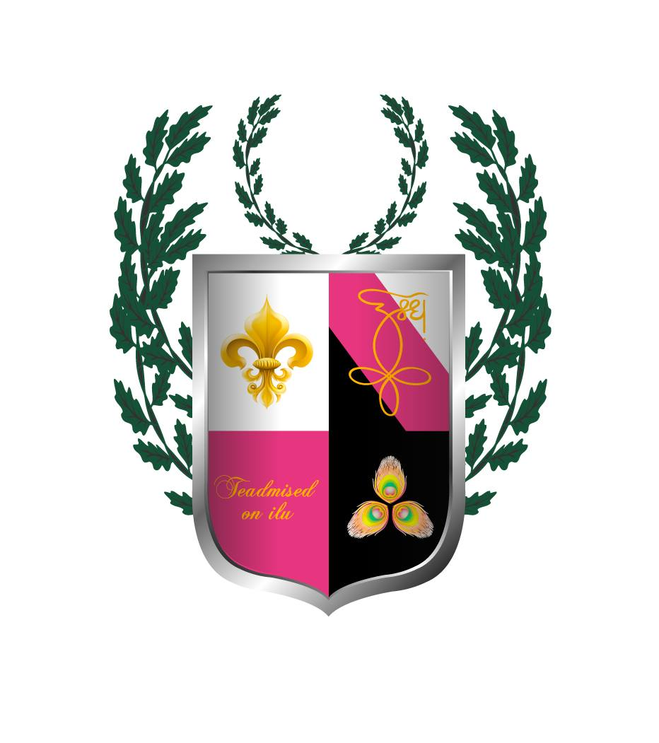 Korp! Sororitas Estoniae vapp